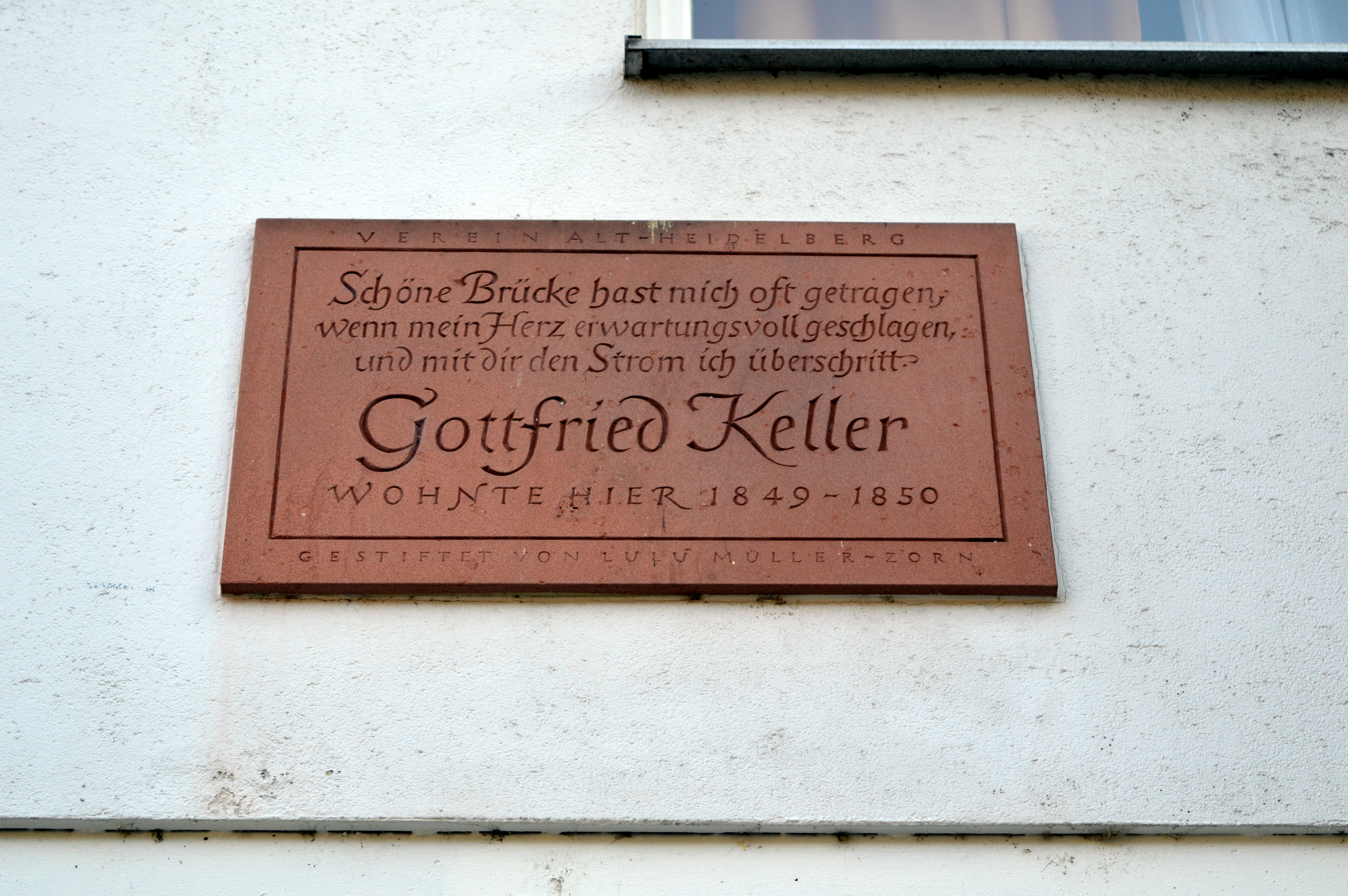 Tafel am Heidelberger Wohnhaus in der Nähe der Alten Brücke